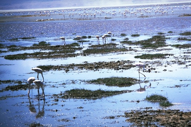 Ngorongoro National Park - Tanzania